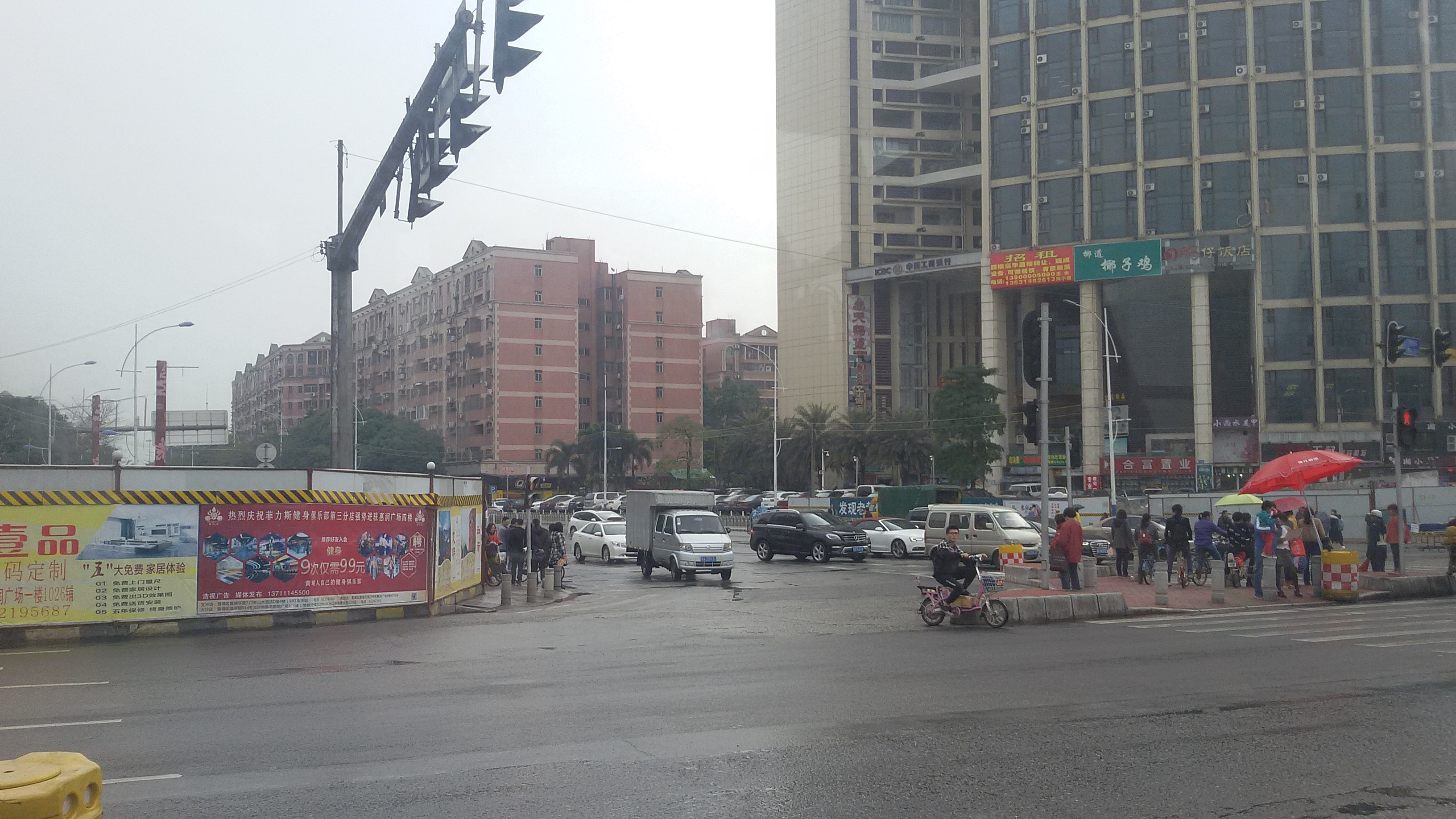 粵語: 廣州地區，豐樂南路同中山大道東、黃埔東路嘅交界。